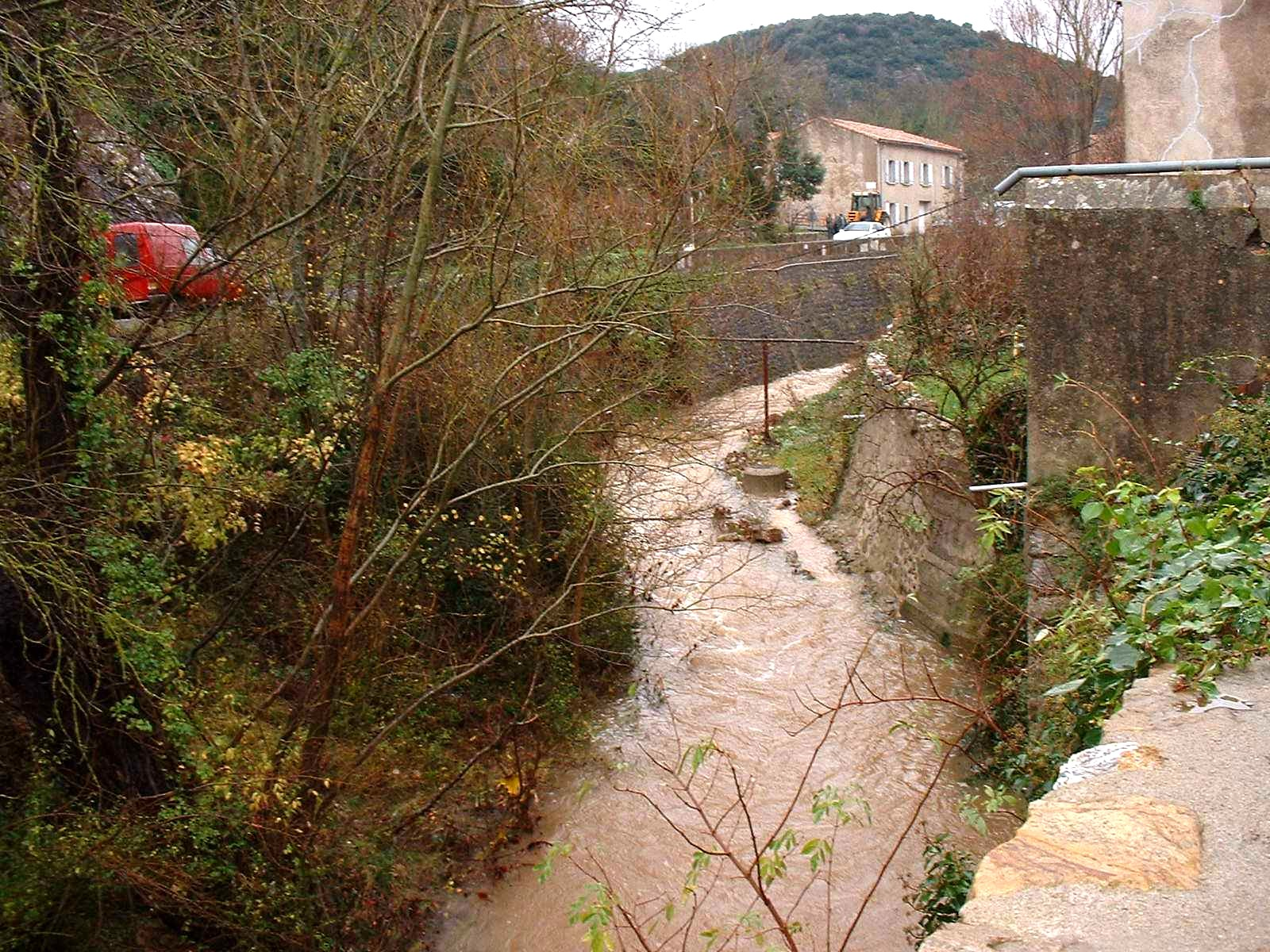 Laroque-de-Fa (France) - Le Sou (1)